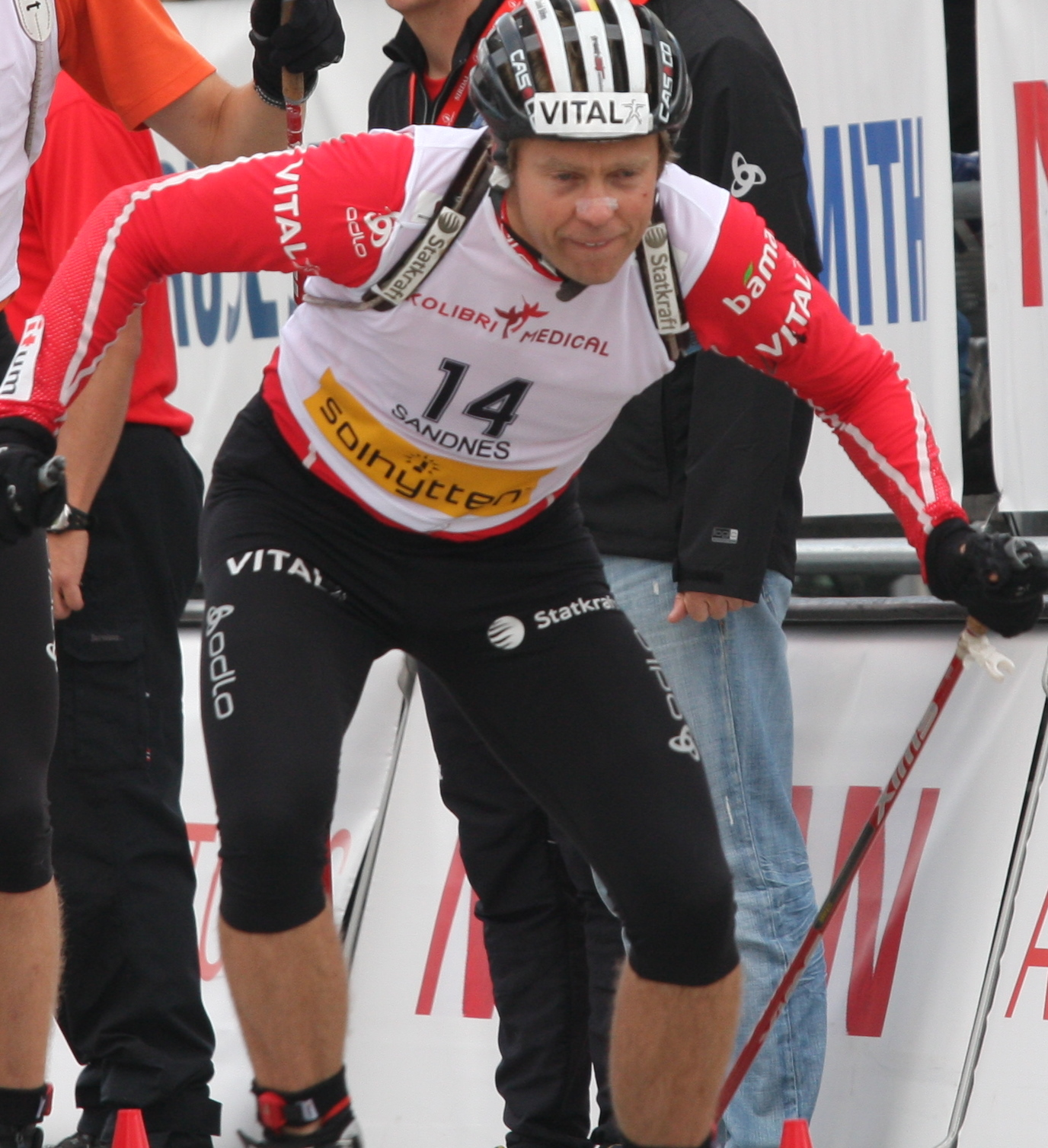 Hallvard Hanevoll Blinkfestivalen Sandnes 2009